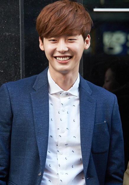 (이종석 x 엠비오) 웹드라마 Long Distance Love 고화질 현장사진